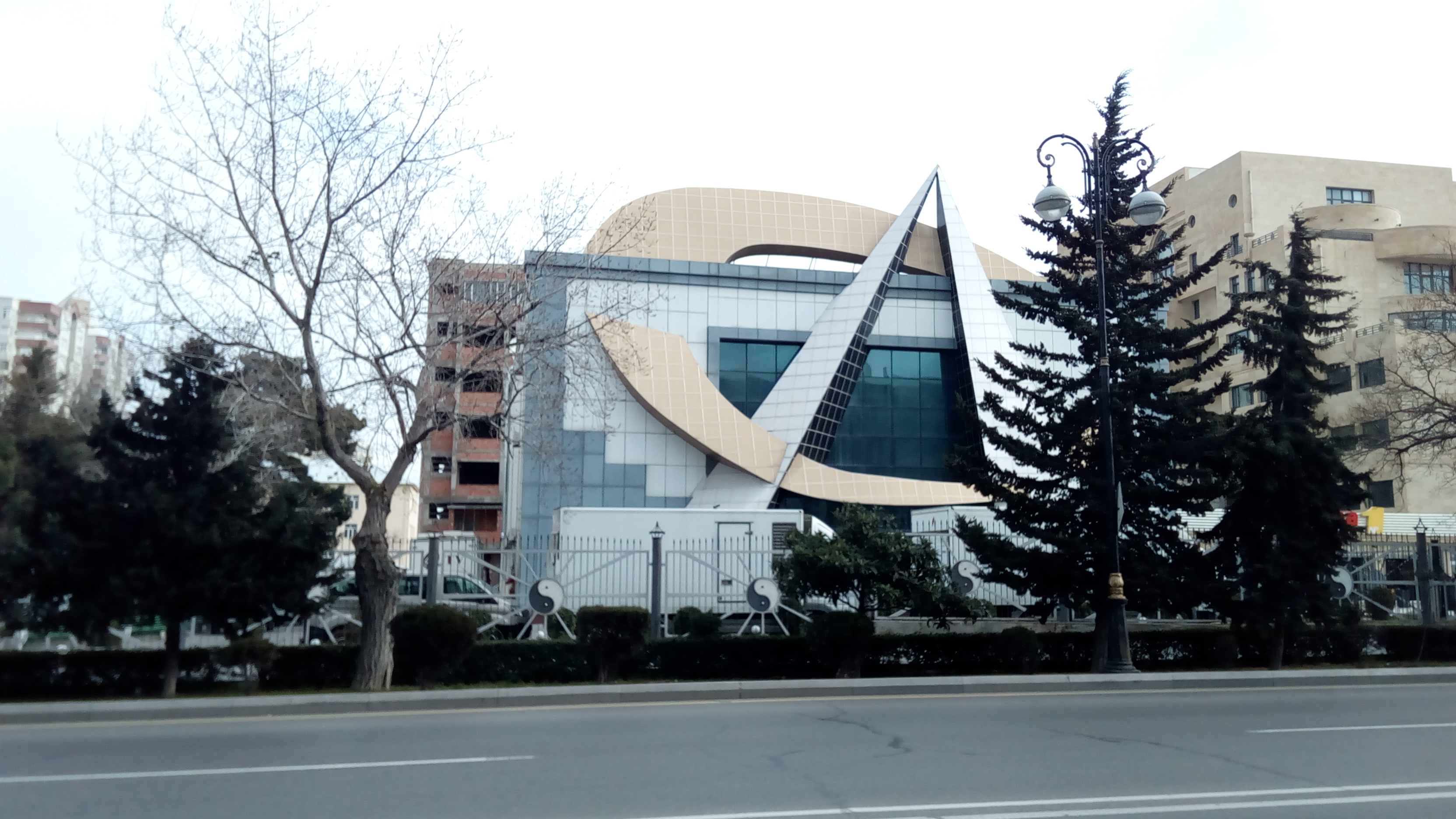 Space TV-nin binası